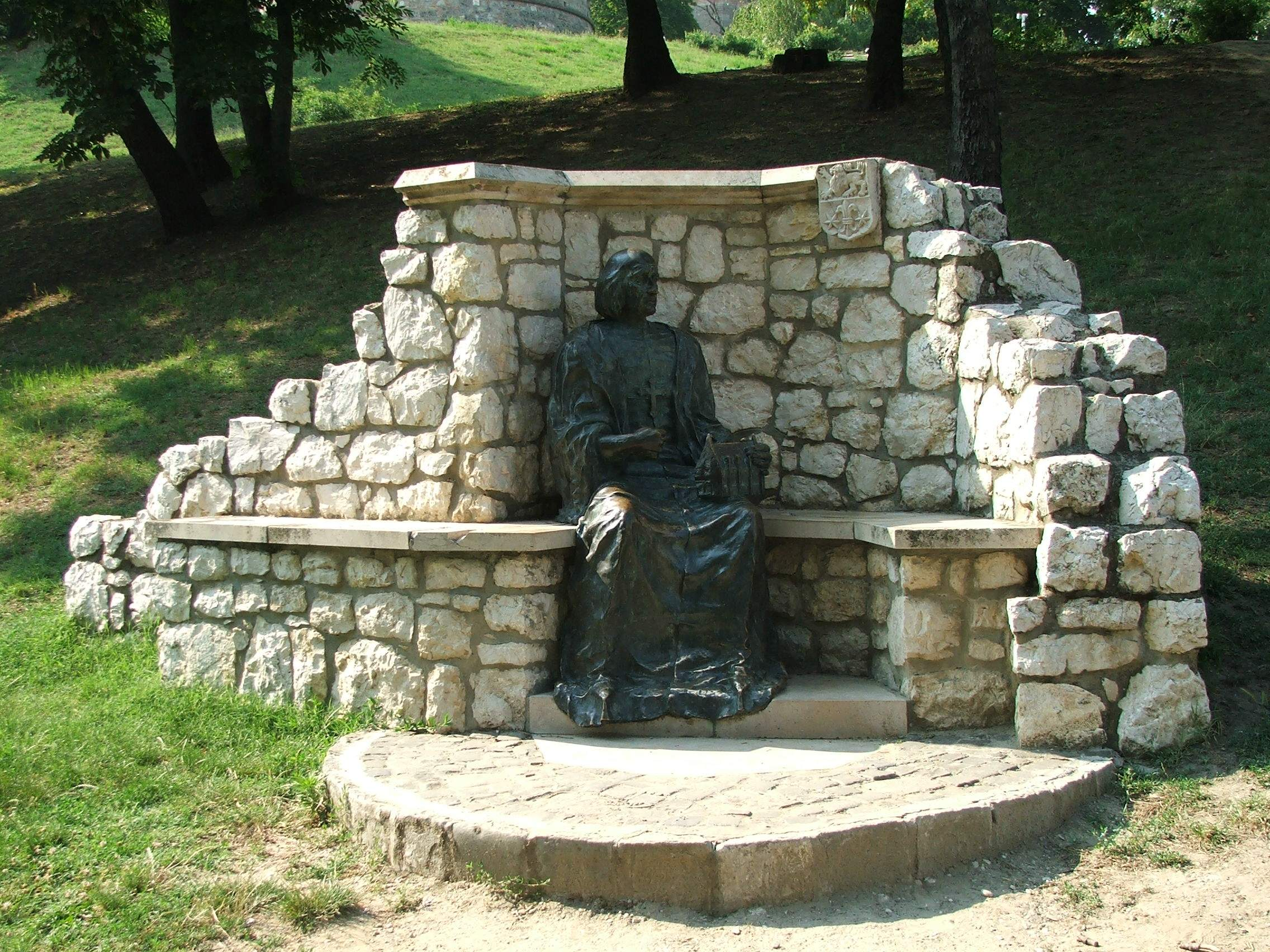 The statue of János Vitéz in Esztergom, Hungary. Sculptor: Zoltán Szentirmai Vitéz János szobra Esztergomban. Szentirmai Zoltán alkotása